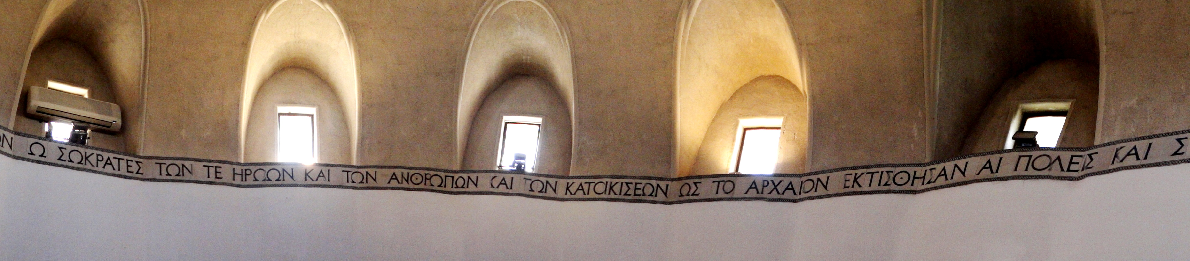 Inscription in the round conference room of the Rockefeller Museum Israel Antiquities Authority, which appears in the dialogue by Plato. The Inscription is set by the Rockefeller Museum architect during the construction of the building כתובת בחדר הישיבות העגול של רשות העתיקות במוזיאון רוקפלר, ובה מופיע דיאלוג שכתב אפלטון. הכתובת נקבעה על ידי אדריכל מוזיאון רוקפלר בעת בניית המבנה. הפעם הראשונה בה הוזכרה בכתובים המילה "ארכאולוגיה" הייתה בדיאלוג פרי עטו של אפלטון המספר על שיחה שהתקיימה בין סוקרטס הפילוסוף היווני בן המאה ה-5 לפנה"ס והיפיאס. בשיחה עונה היפיאס לשאלת סוקרטס "מה מעניין אנשים?", תשובת היפיאס היתה: "עמים, גיבורים ובני אדם, יישובים וכיצד נוסדו הערים בימי קדם, ובקיצור, הם מוכנים לשמוע על ארכאולוגיה". (אפלטון,היפיאס רבה, 285 ד).